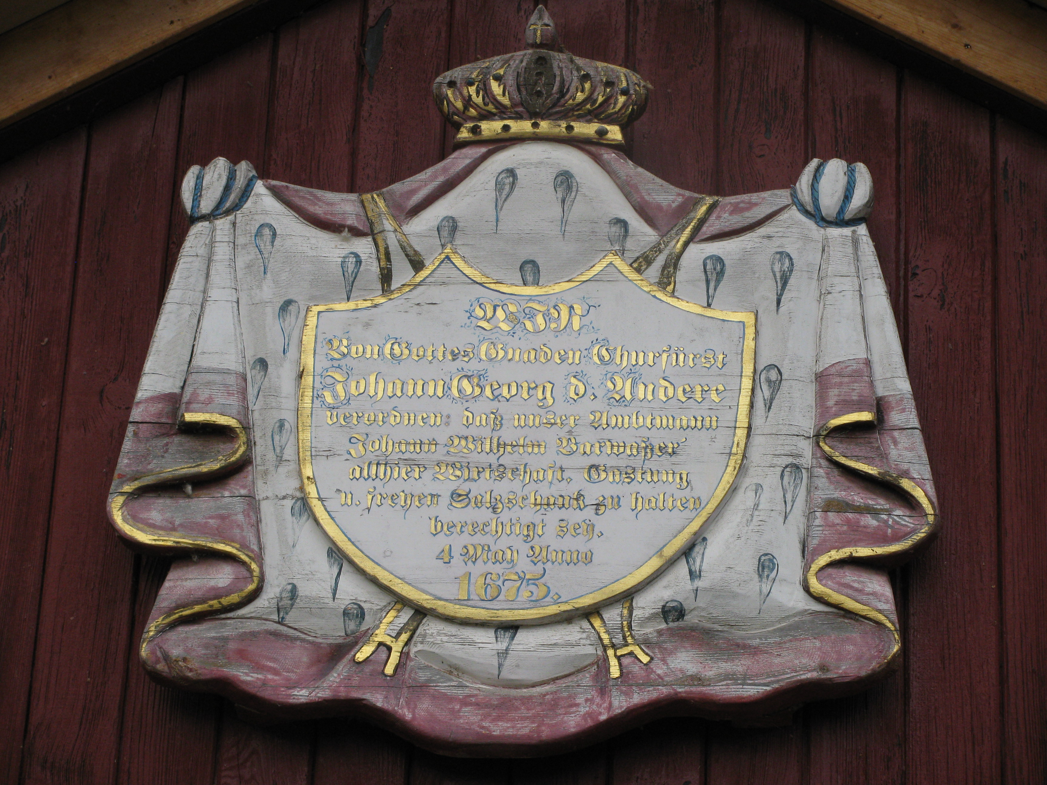 Fassadendetail am Hauptgebäude von Adams Gasthof am Markt des früheren Marktfleckens Eisenberg, Gemeinde Moritzburg, Sachsen